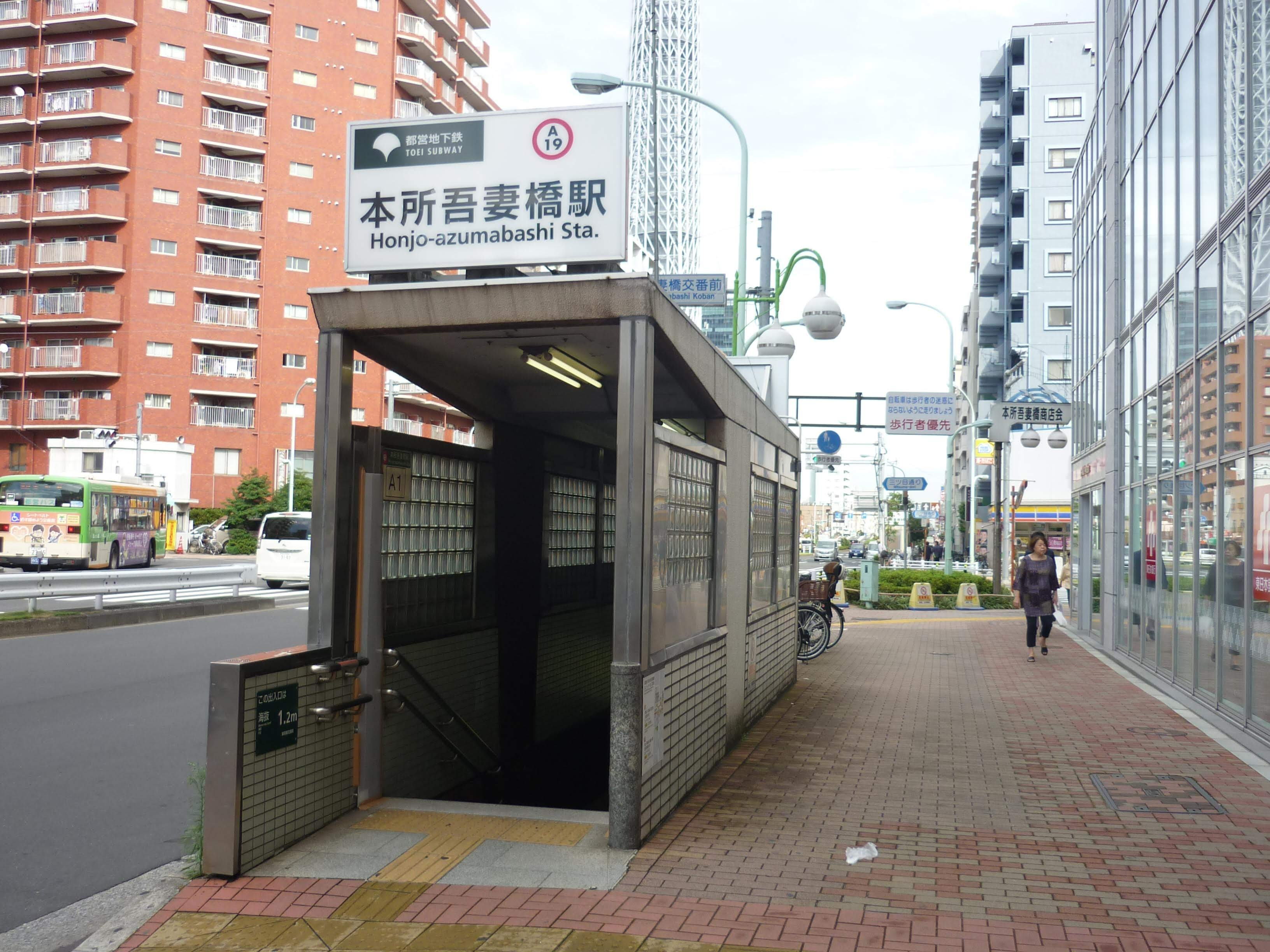 本所吾妻橋